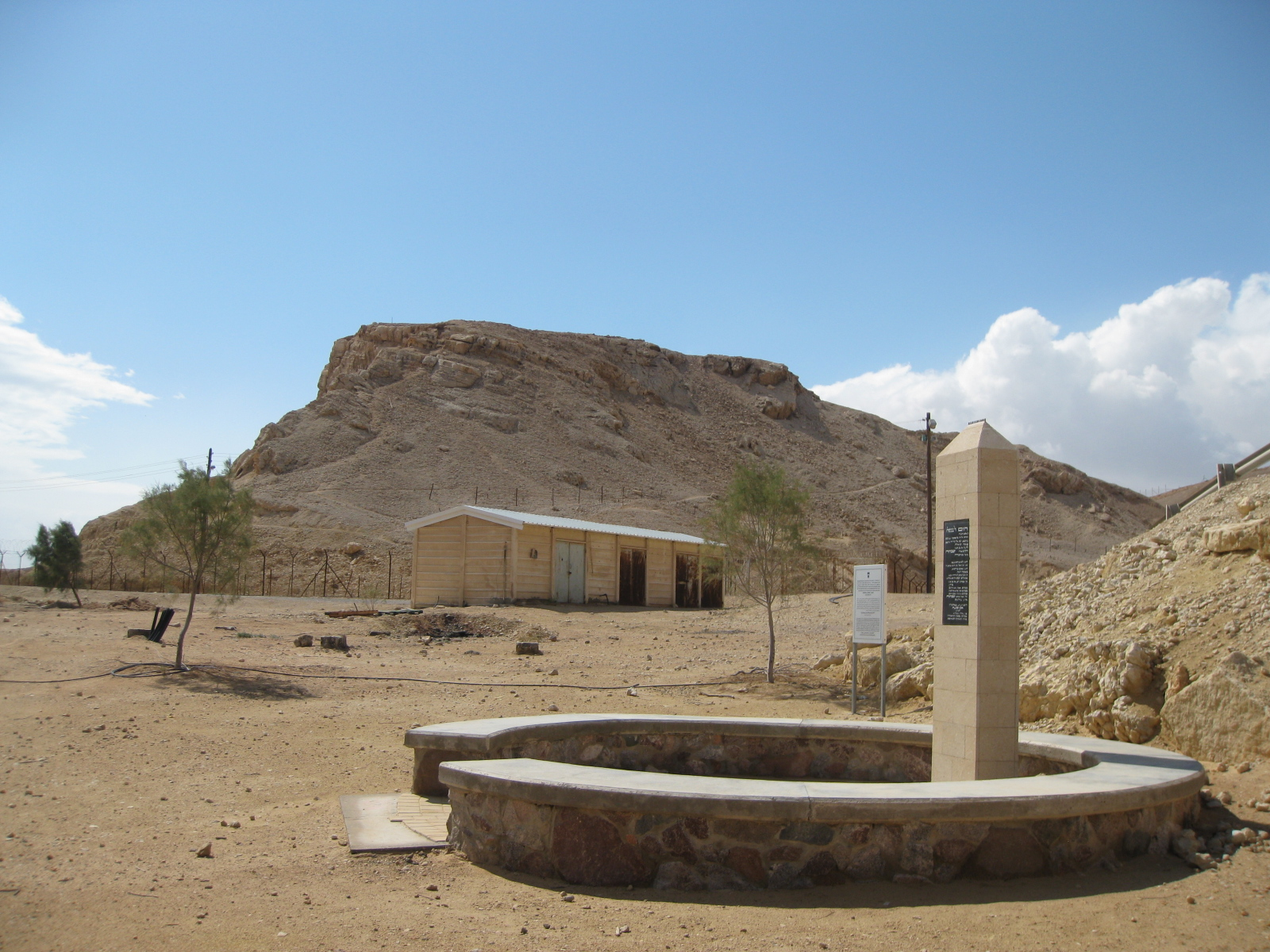 מבט על הגבעה עליה נבנתה המצודה בתקופת הברזל, מבט מחצר קיבוץ יוטבתה לכיוון דרום